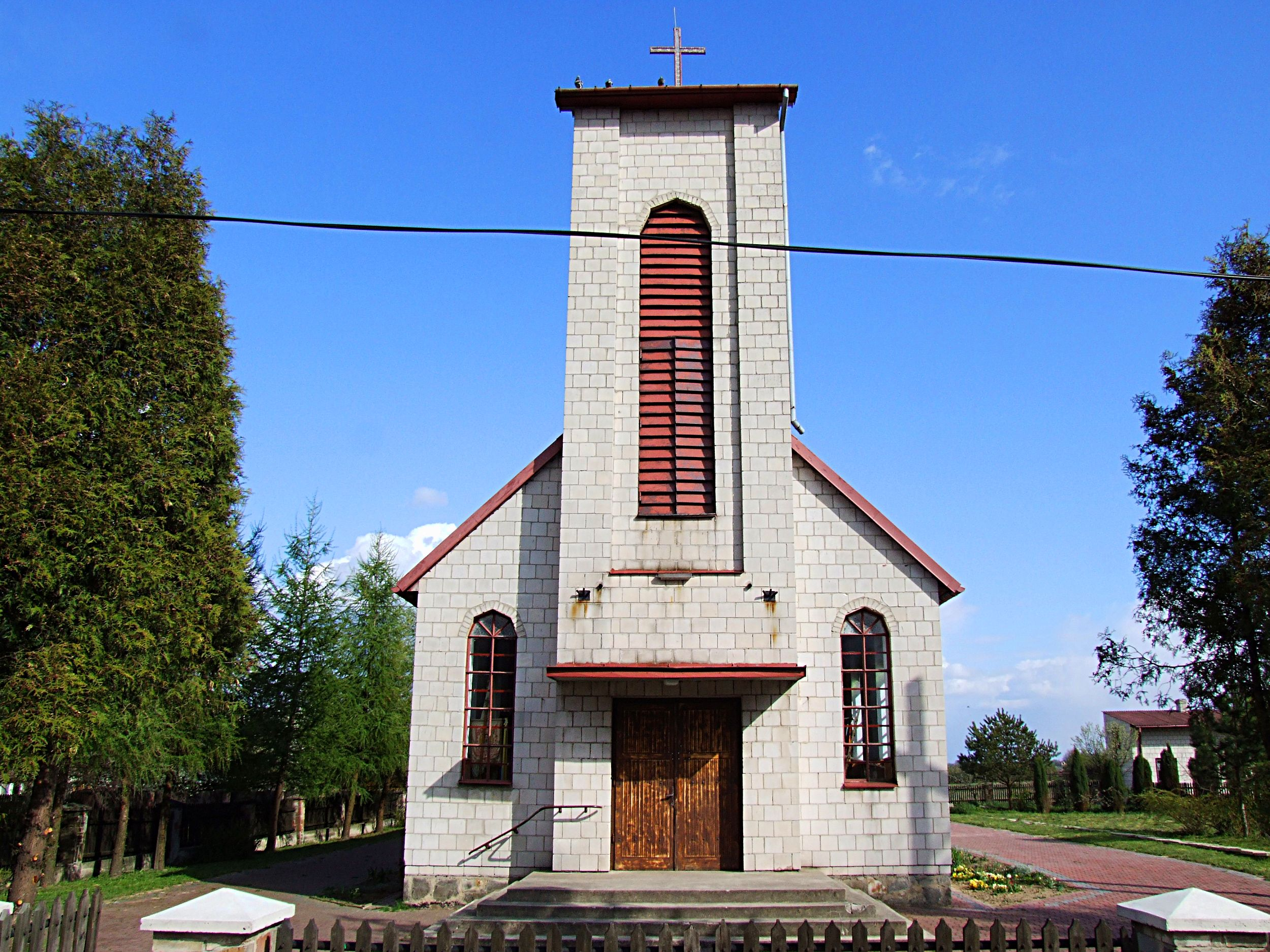 Kościół w Lipowym Polu Plebańskim